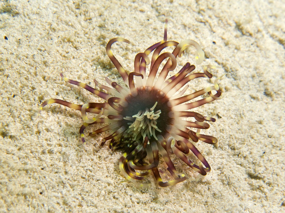 Arachnanthus nocturnus, Koh Phangan, Tailandia